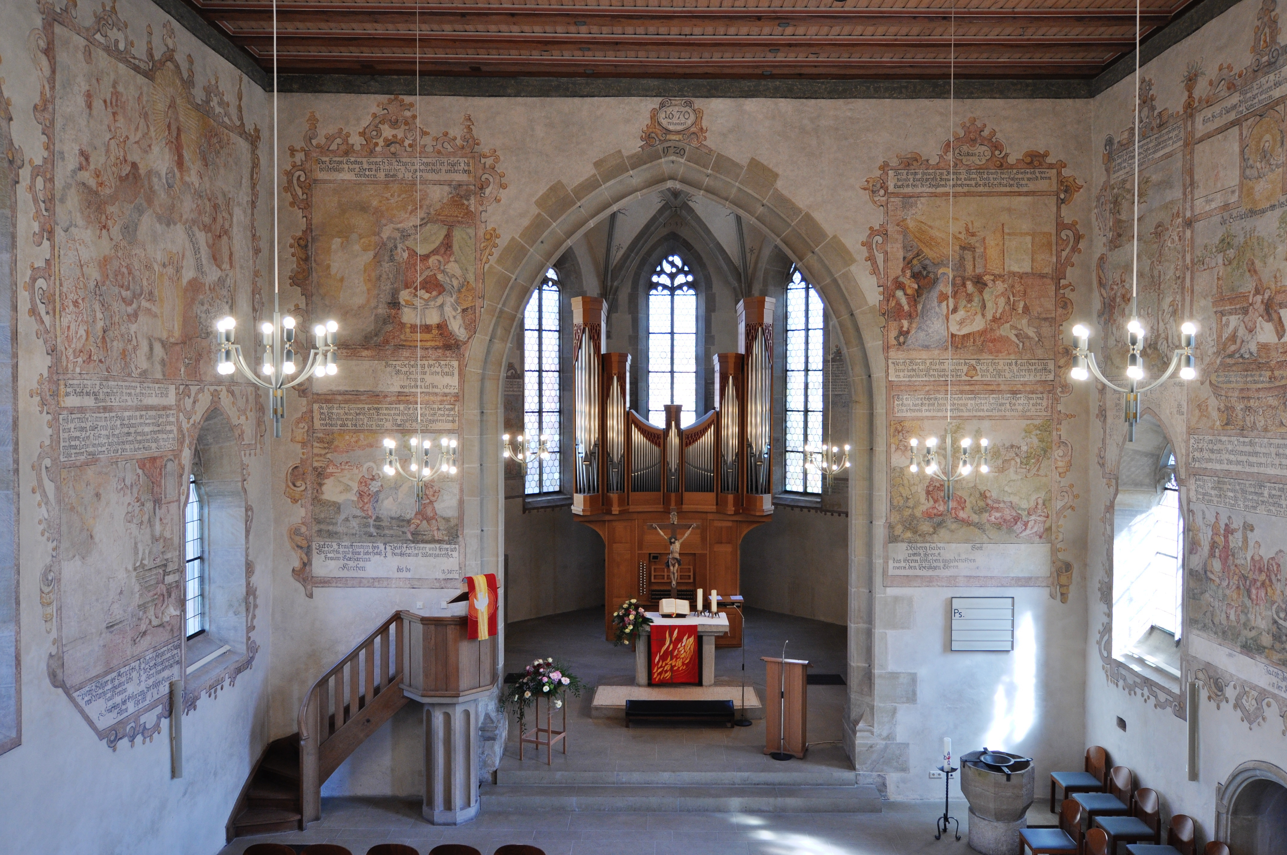 Kilianskirche in Bissingen an der Enz, Innenansicht